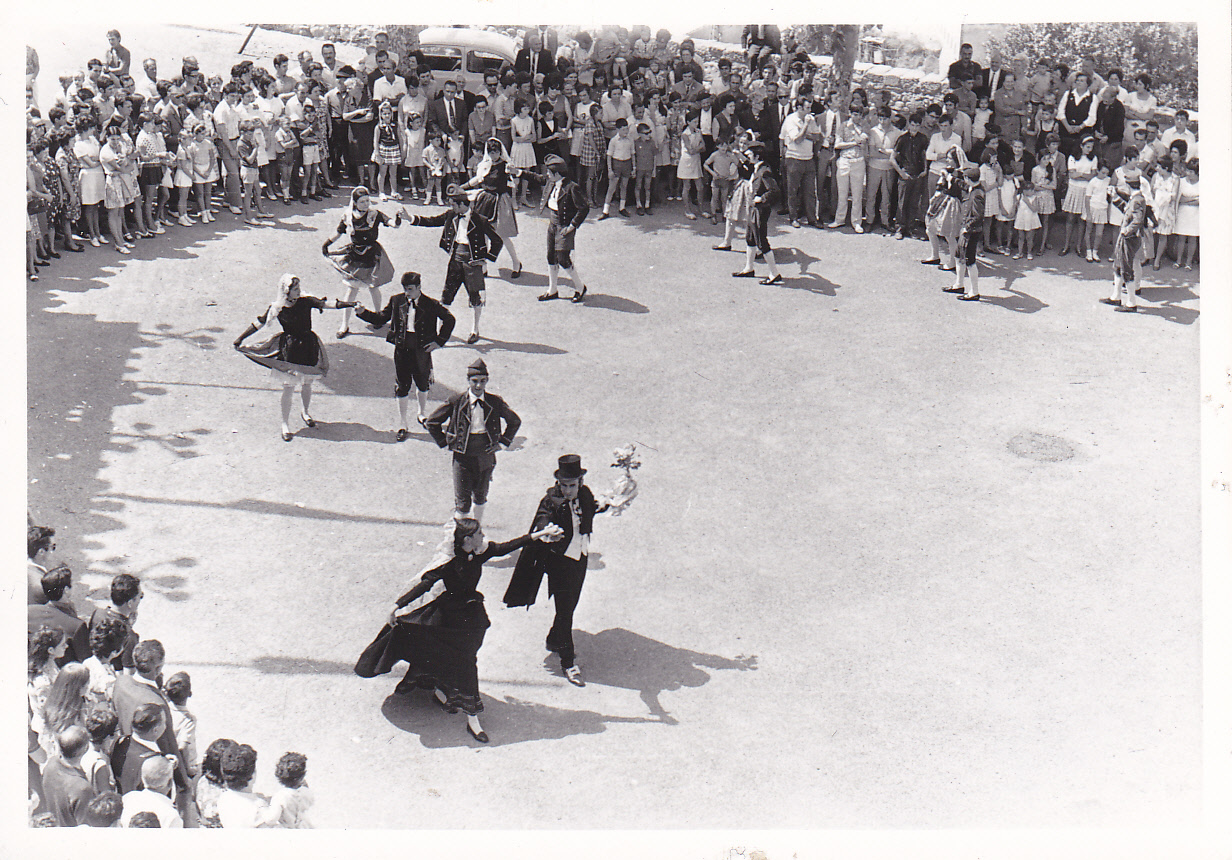 Els dansaires ballen el Ball de l'Almorratxa a la plaça de l'Ajuntament de Gironella, durant la Festa Major del poble de l'any 1970.